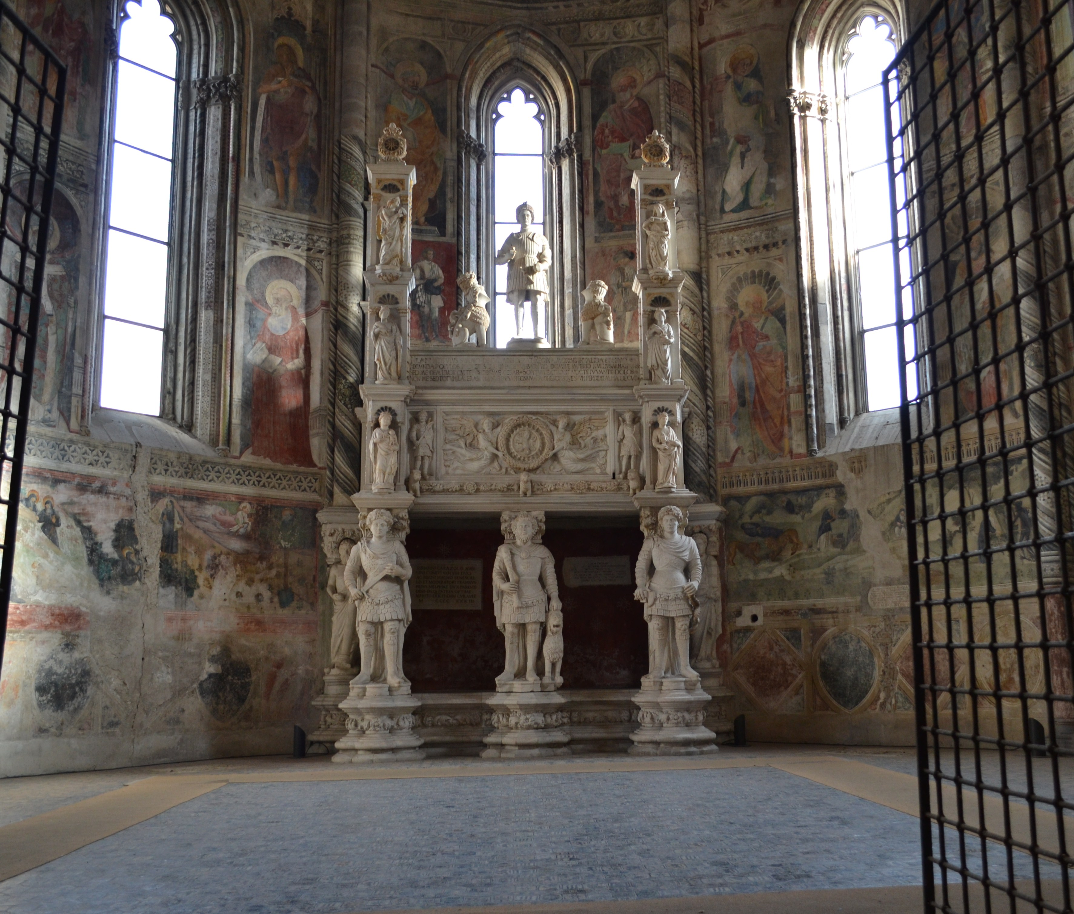 Cappella Caracciolo del Sole. Sepolcro di Sergianni Caracciolo Chiesa di San Giovanni a Carbonara - Napoli